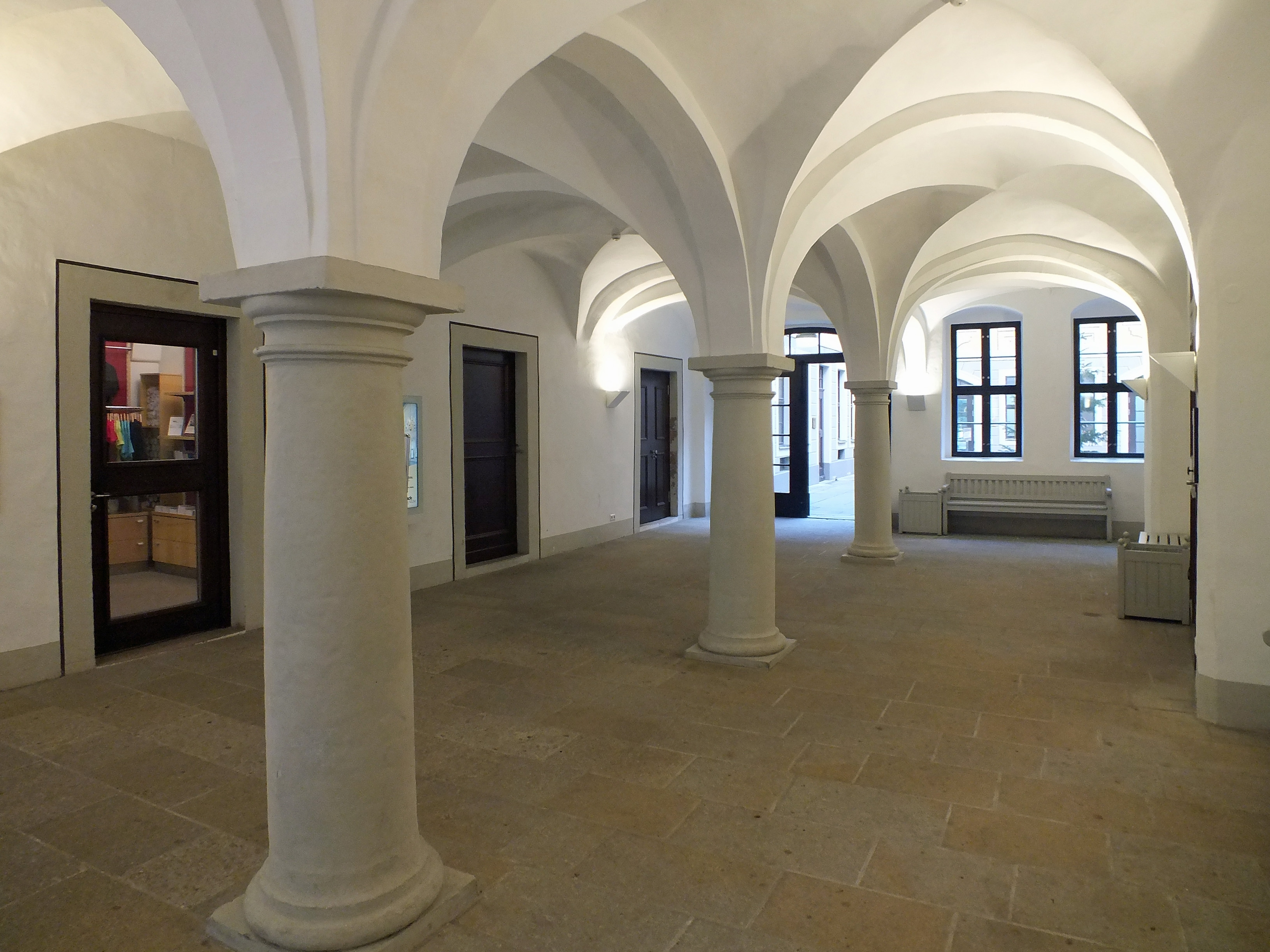 Das Kreuzgewölbe im Erdgeschoss des Bosehauses in Leipzig